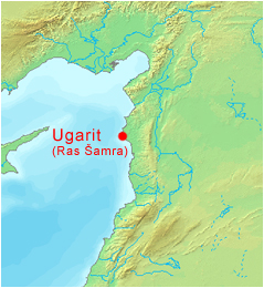 Mapa syrské archeologické lokality Ugarit (dnešní Ras Šamra). Při úpravě mapy byl použit software DEMIS World Map Server.